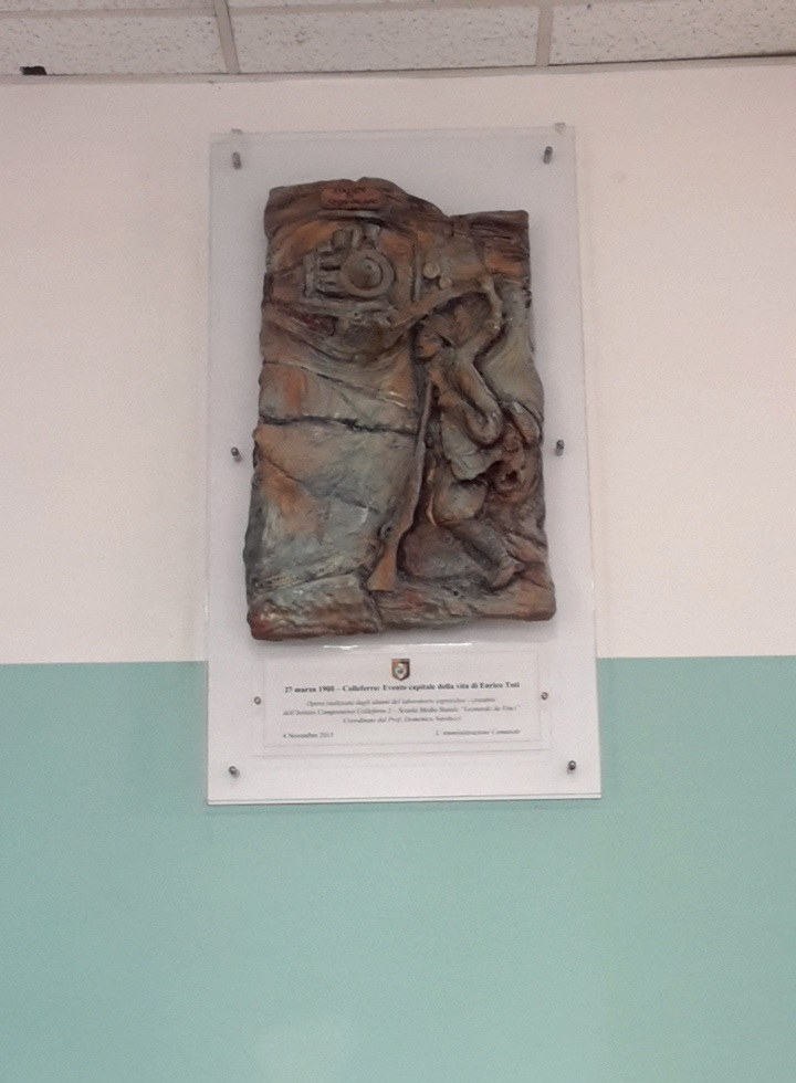 targa a memoria di Enrico Toti presso la stazione di Colleferro